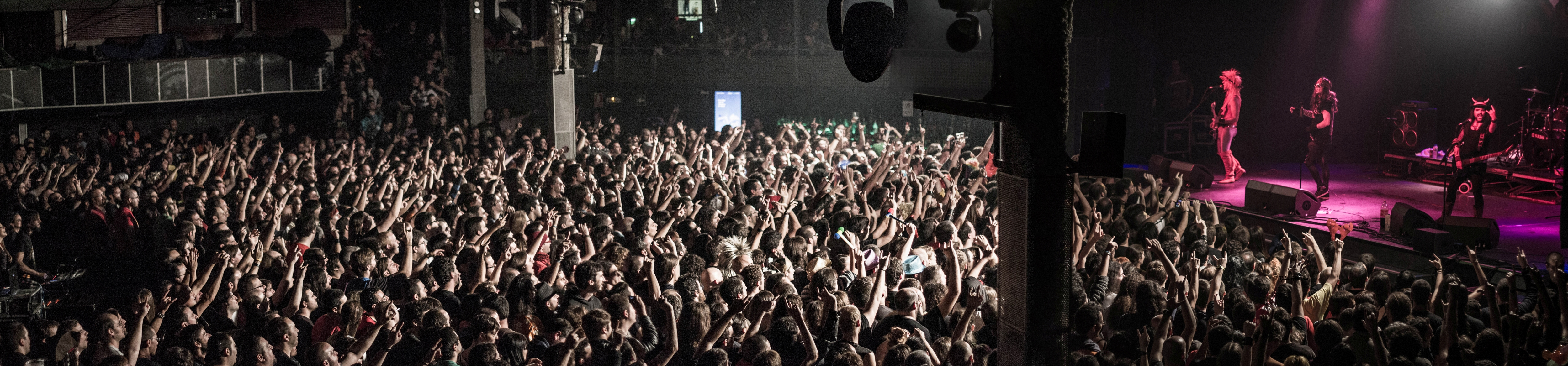 Gigatrón actuando durante el Festival Mundo Idiota 2012, en la sala Riviera